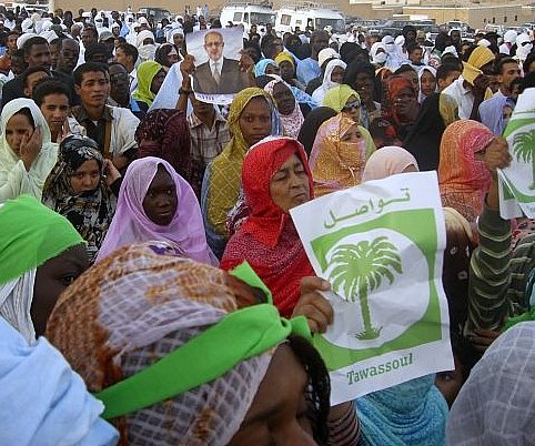 Protestas contra el golpe de Estado en Mauritania en la ciudad de Noadibú. Agosto de 2008